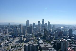 Skyline Seattle, Blick von der Space Needle Andere Versionen